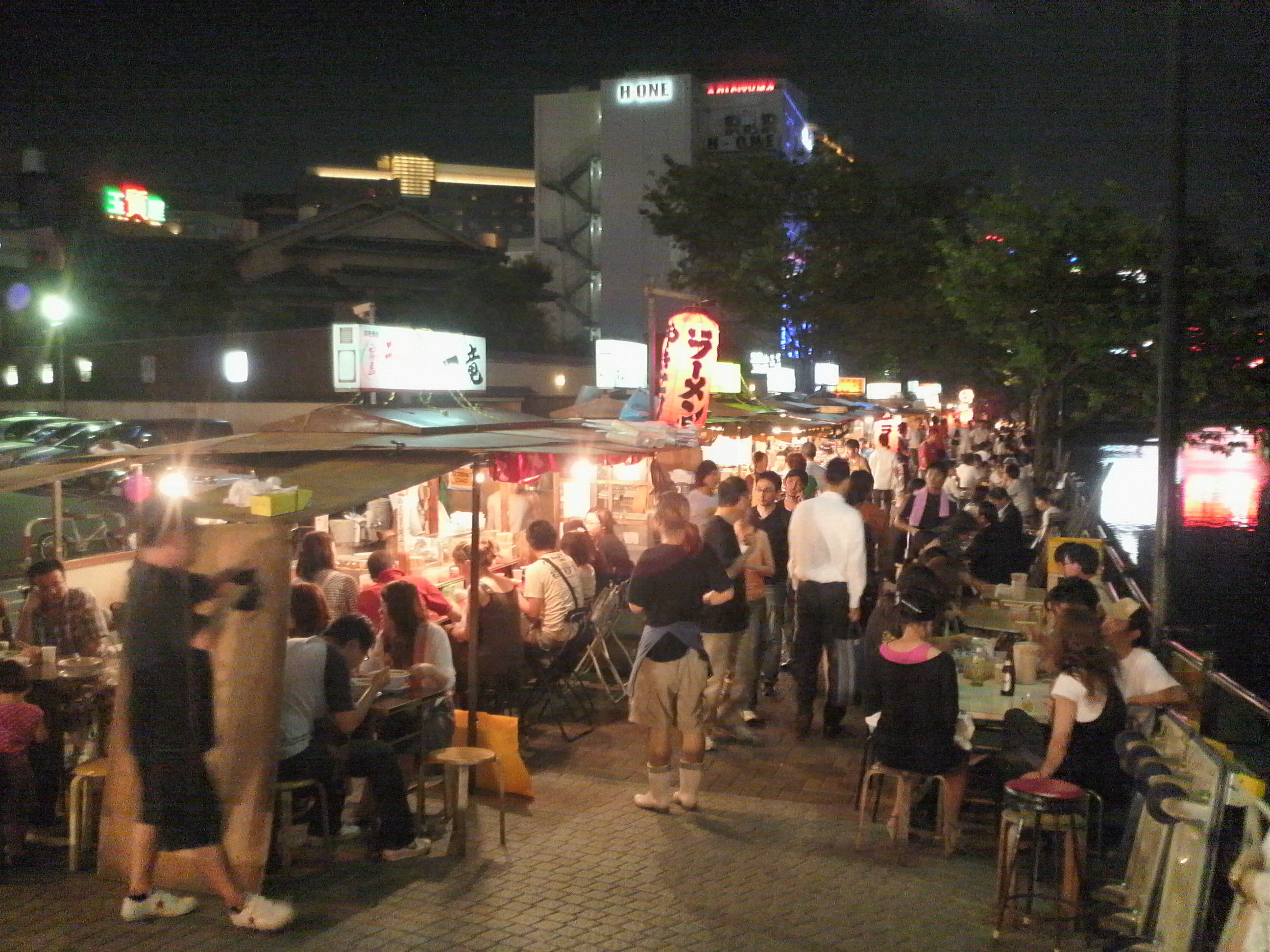 福岡市博多区中洲1丁目にある清流公園の屋台街